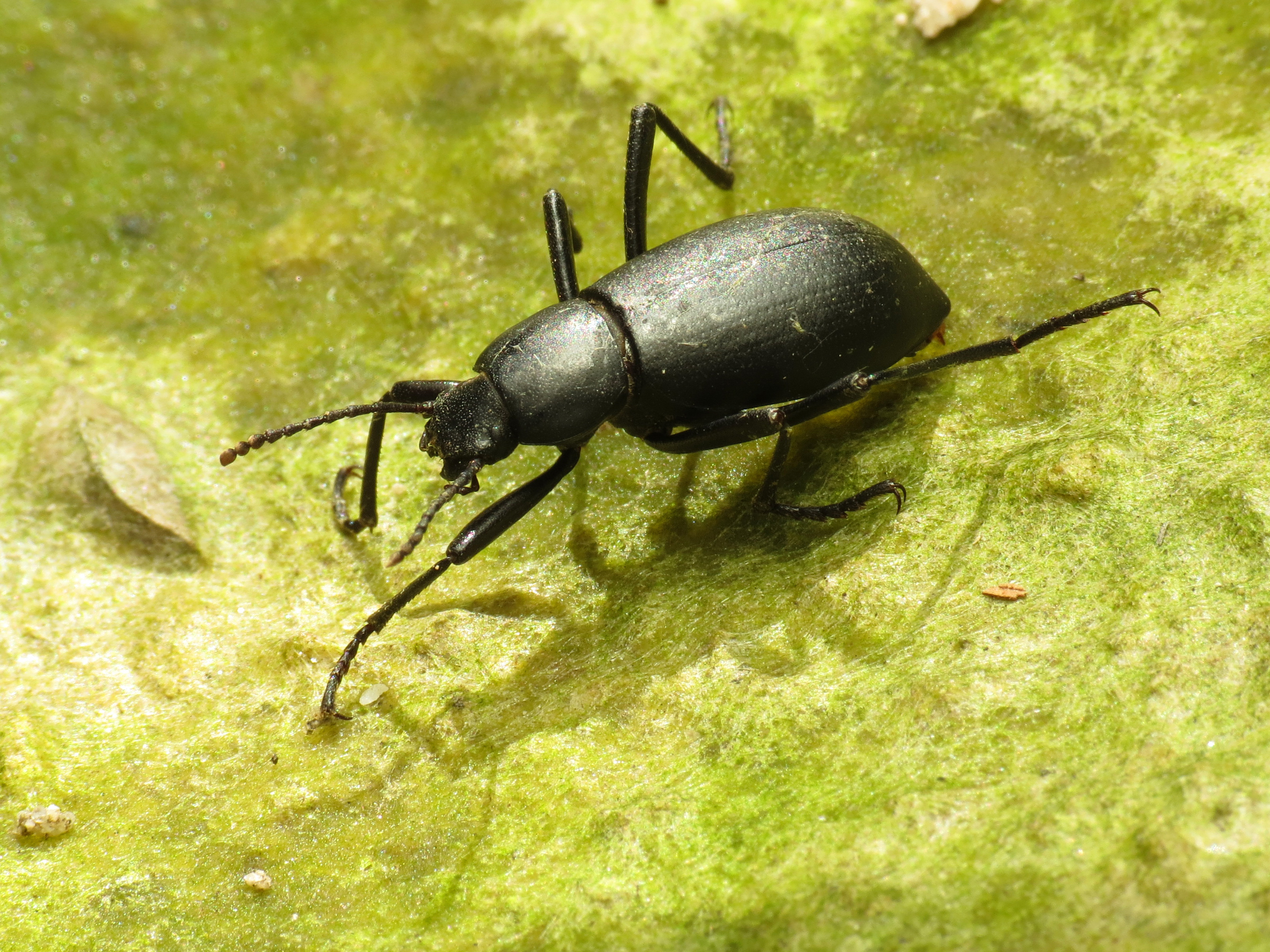 Eleodes sp. Molino Basin, Santa Catalina Mountains, Tucson, Arizona, USA.